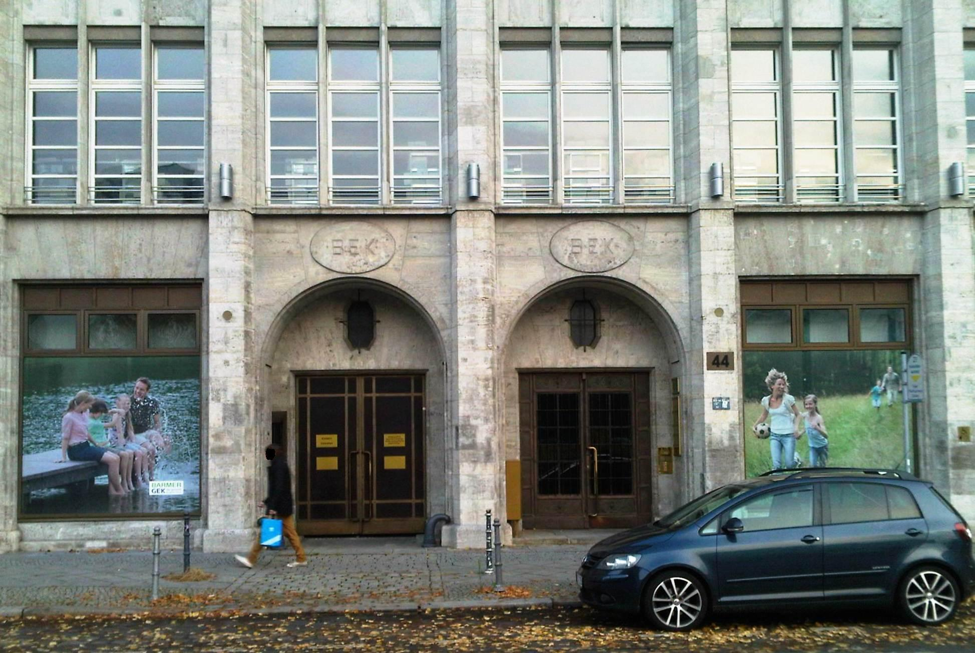 Eingangsbereich zum denkmalgeschützten Gebäudeteil der Barmer GEK in der Axel-Springer-Straße in Berlin-Kreuzberg